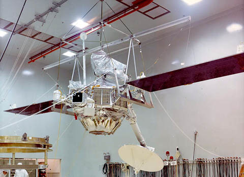 Mariner 10 - NASA